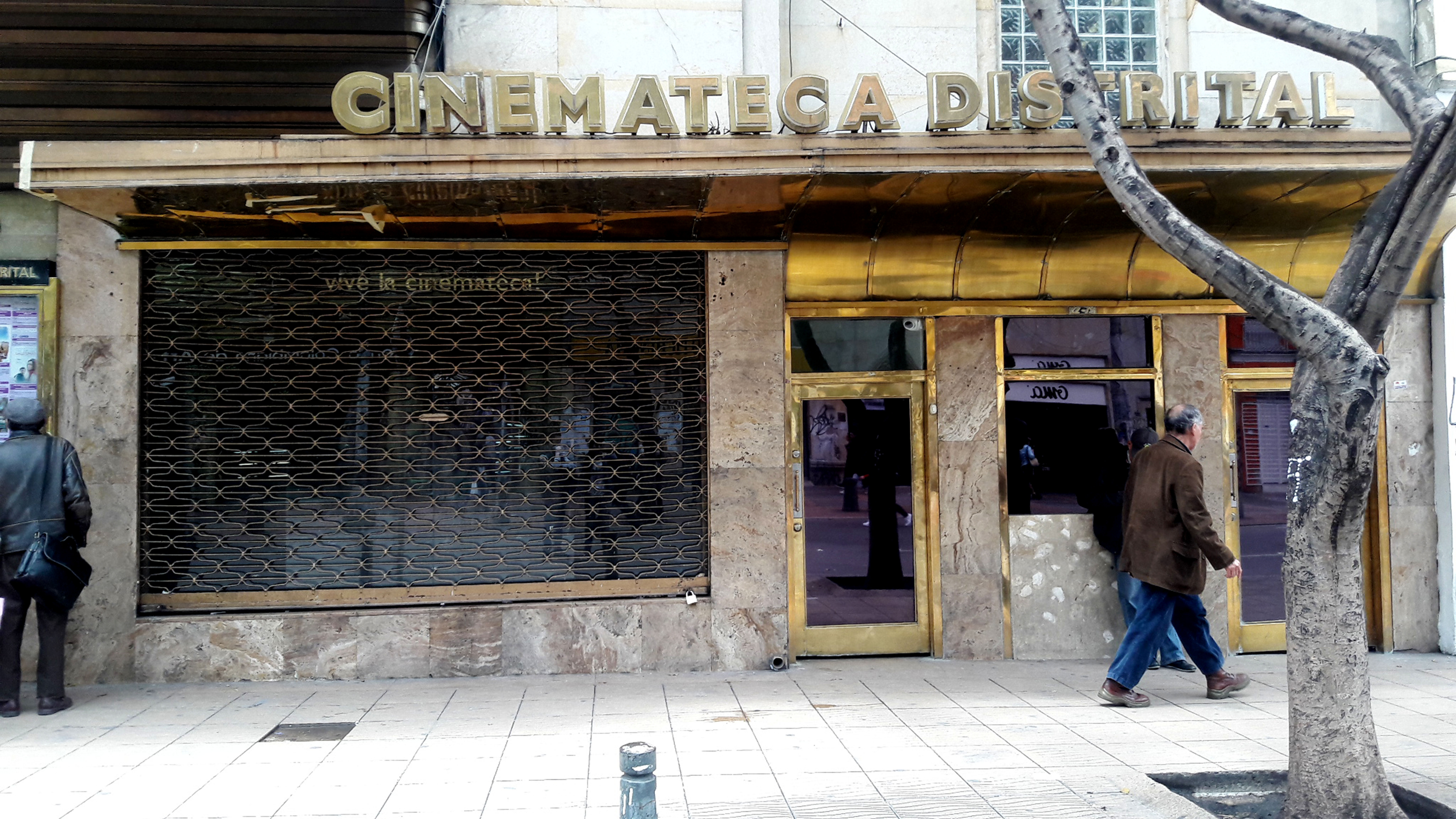 Es la fachada de la cinemateca.